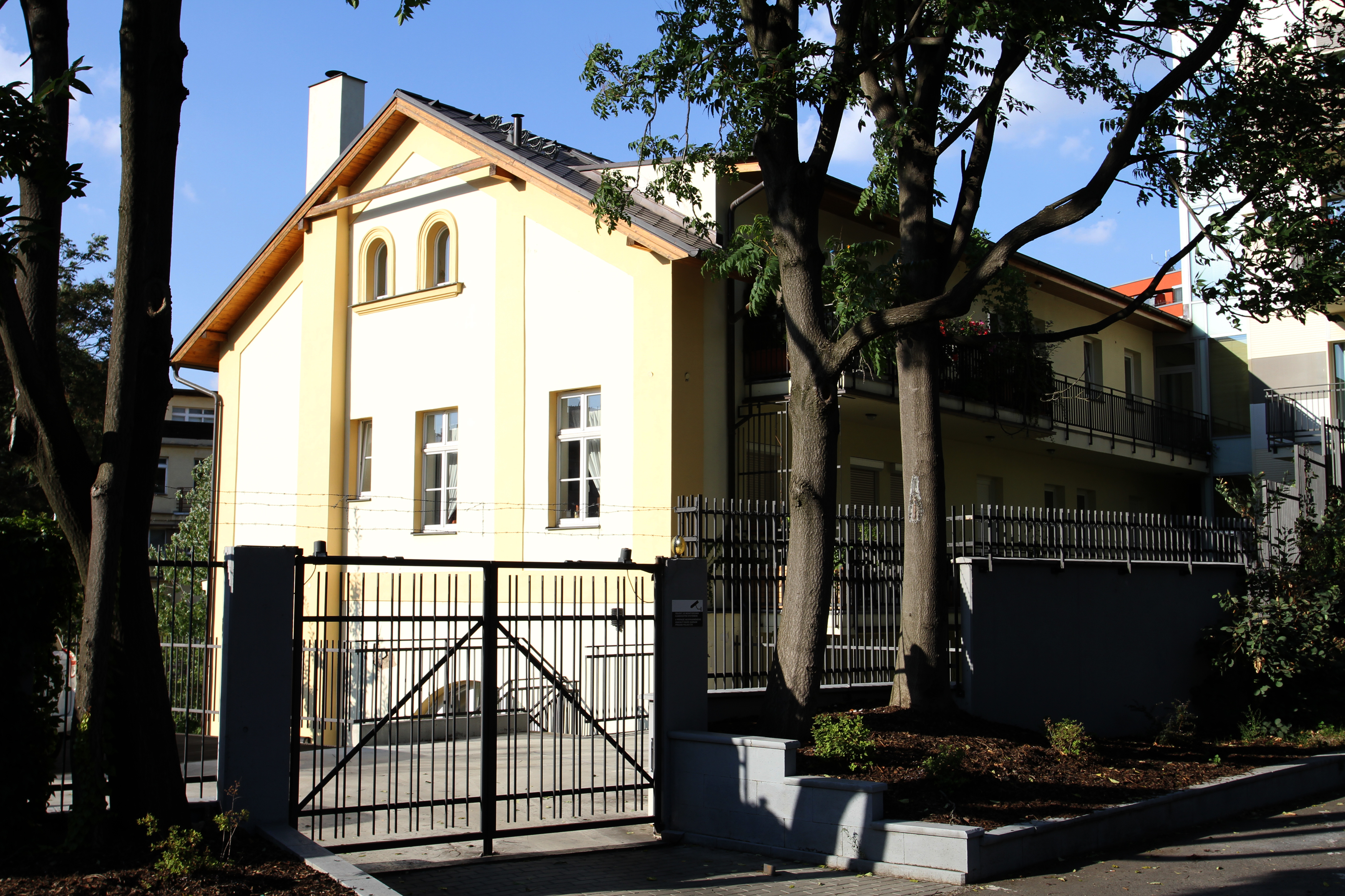 Venkovská usedlost Bezovka (Žižkov), Praha 3, Žižkov, Prokopcova ul. 12 (ve skutečnosti Prokopova ul., domovní číslo se jeví rovněž chybné – č. p. 12 je zcela jinde a č. o. 12 má jiná budova; jako památná vila Bezovka je označena budova Prokopova 2849/2a)